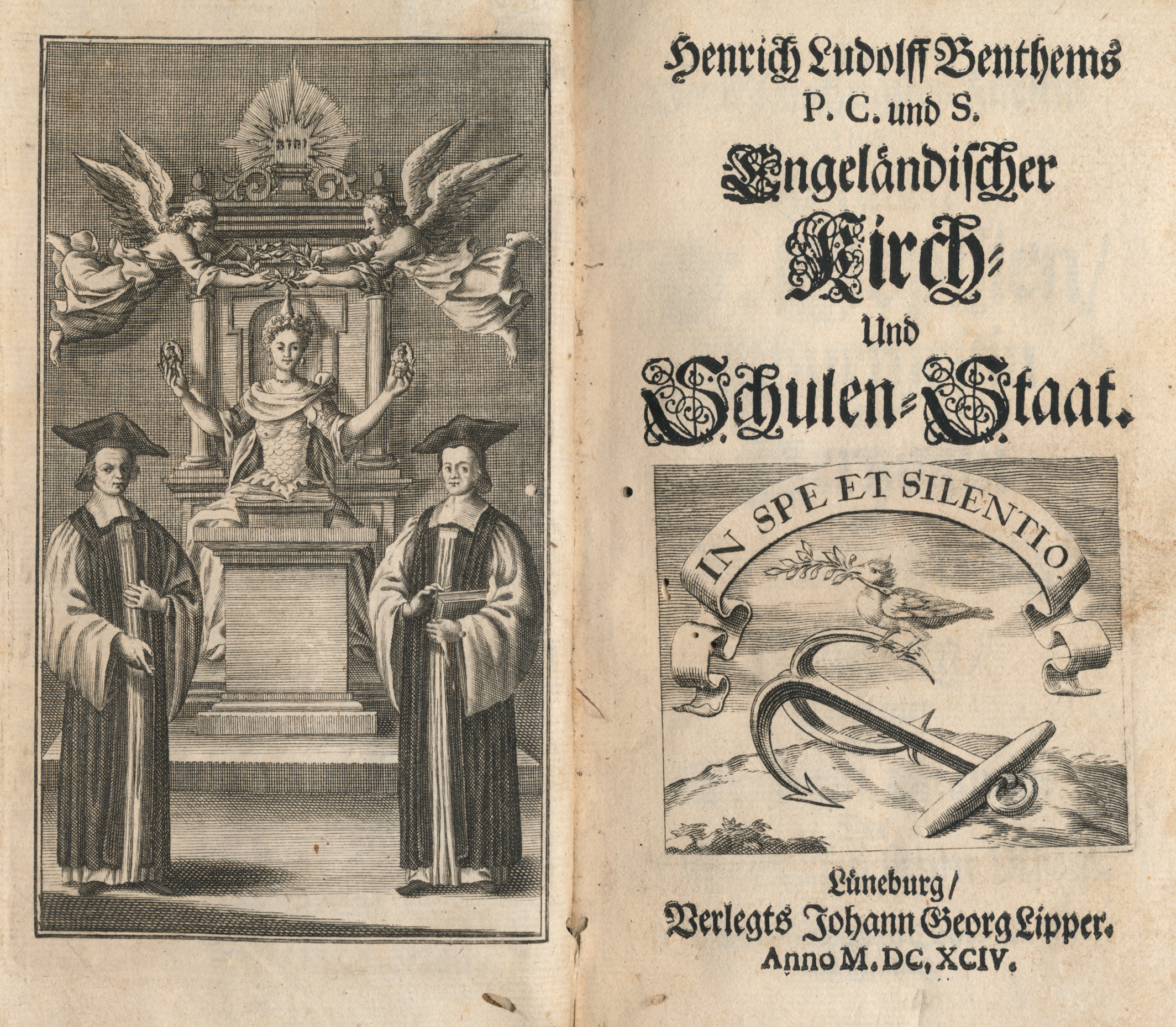 Henrich Ludolff Benthems P. C. und S. Engeländischer Kirch- und Schulen-Staat. Lüneburg / Verlegts Johann Georg Lipper Anno M.DC.XCIV (1694) Aus der Sammlung Peter Schmelzle, Bad Wimpfen